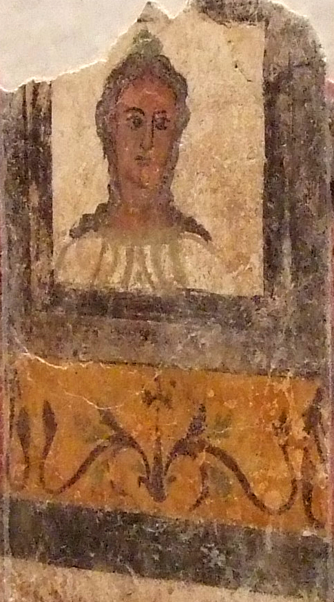 Pintura Mural (114-138 ddC). Caesaraugusta (Calle San Agustín, Zaragoza). Museo de Zaragoza